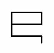 Bayındır Tamgası.